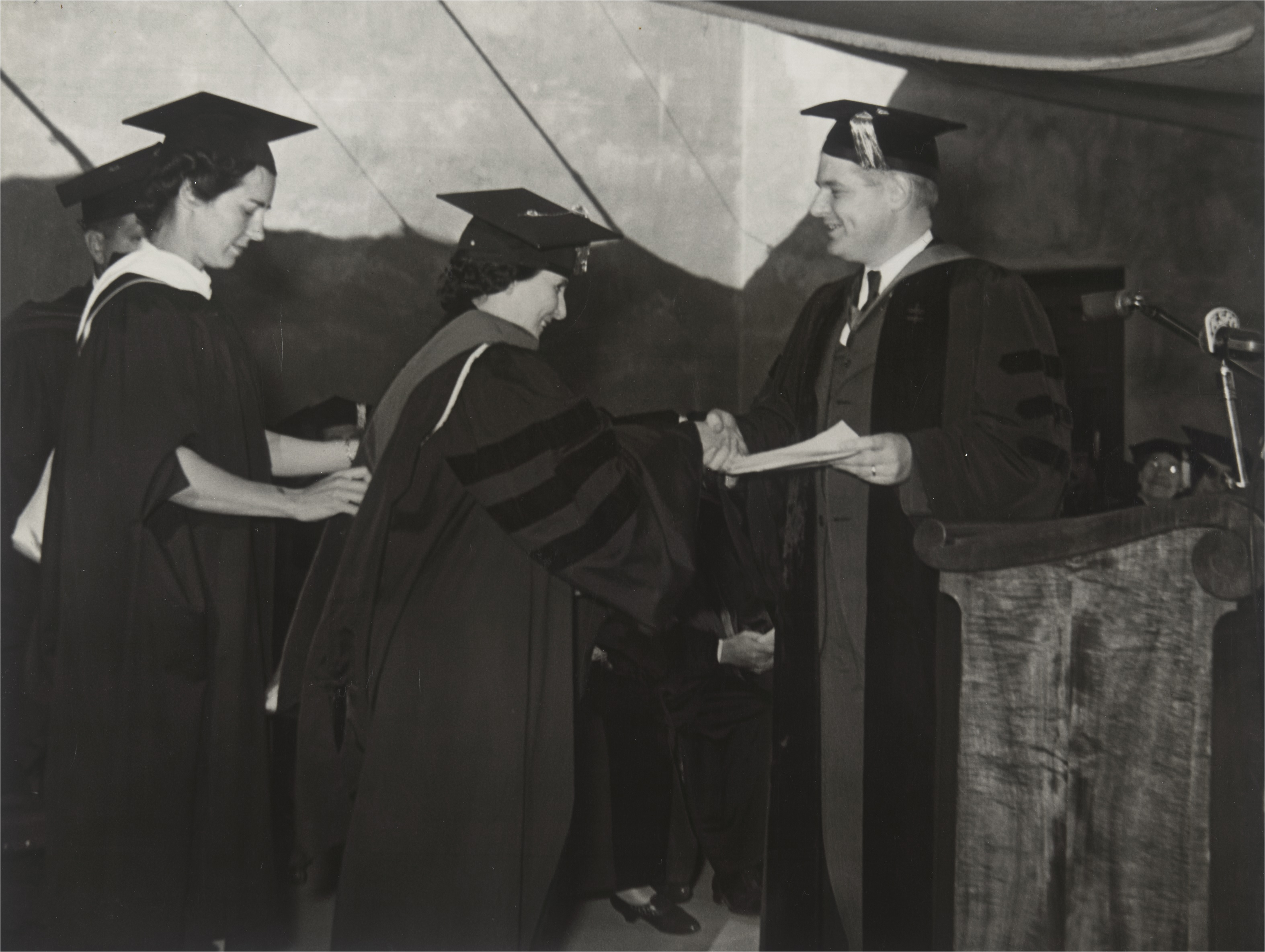 Bertha Lutz recebe o título de Doutor Honoris Causa do Mills College, São Francisco, Estados Unidos da América. Fundo: Federação Brasileira pelo Progresso Feminino.